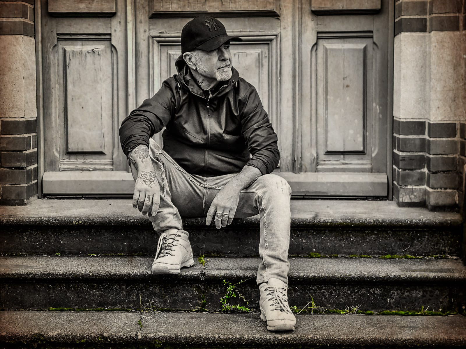 fotografía : Paco Manzano